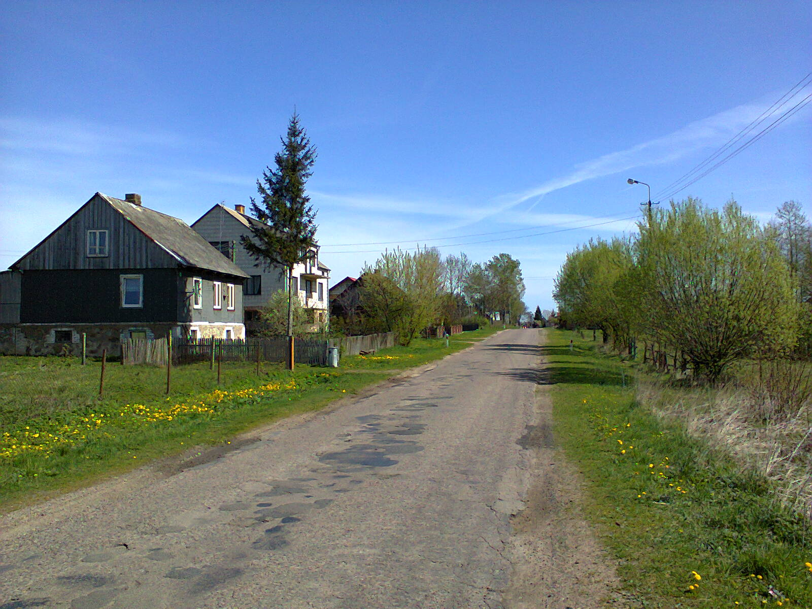 Nowa Kubra